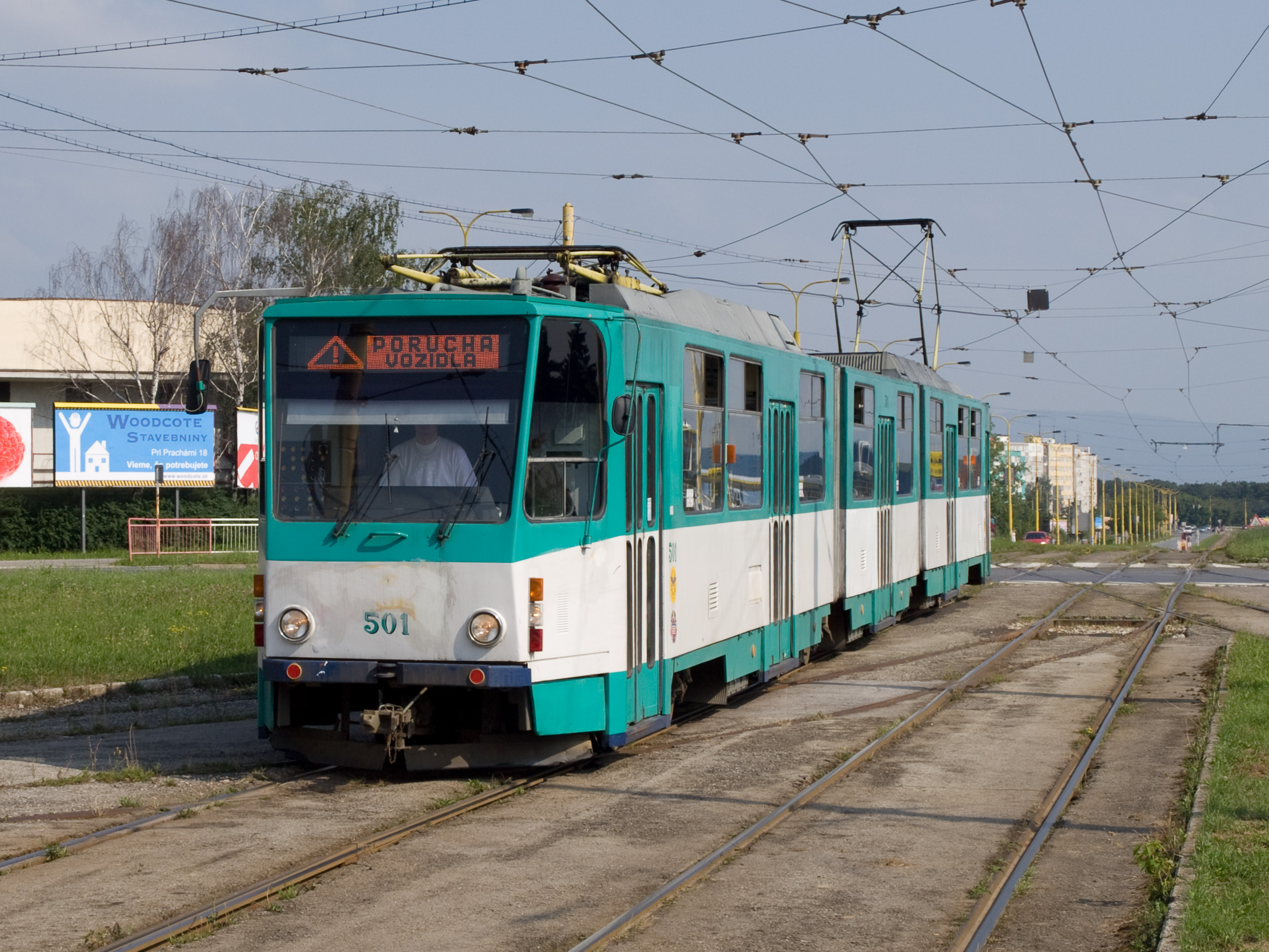 Tatra KT8D5, Moldavská cesta, Košice